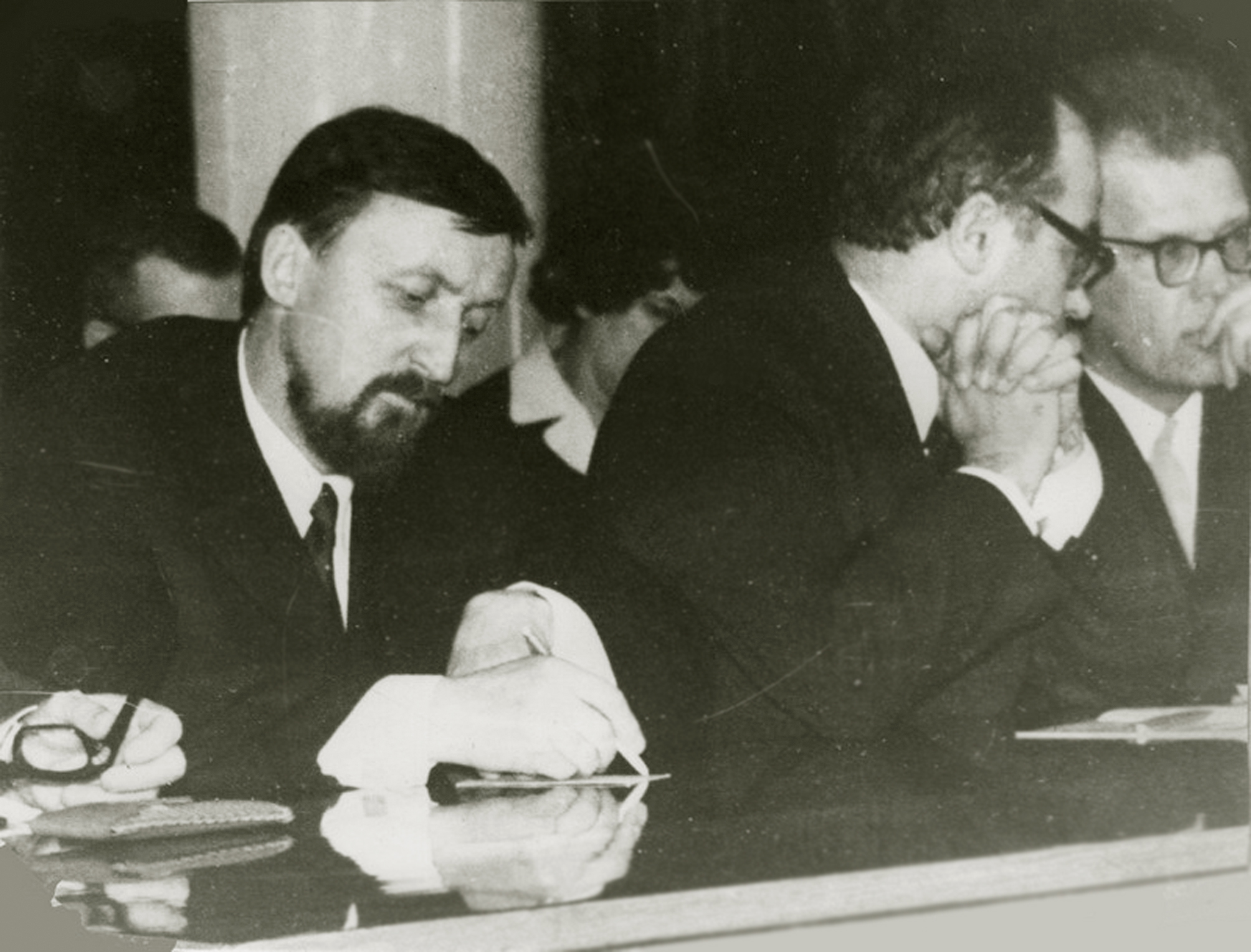 2-й Всесоюзный симпозиум по общению. Президиум Б.Д. Парыгин, Г.М. Андреева, А.В. Петровский, А.А. Бодалев